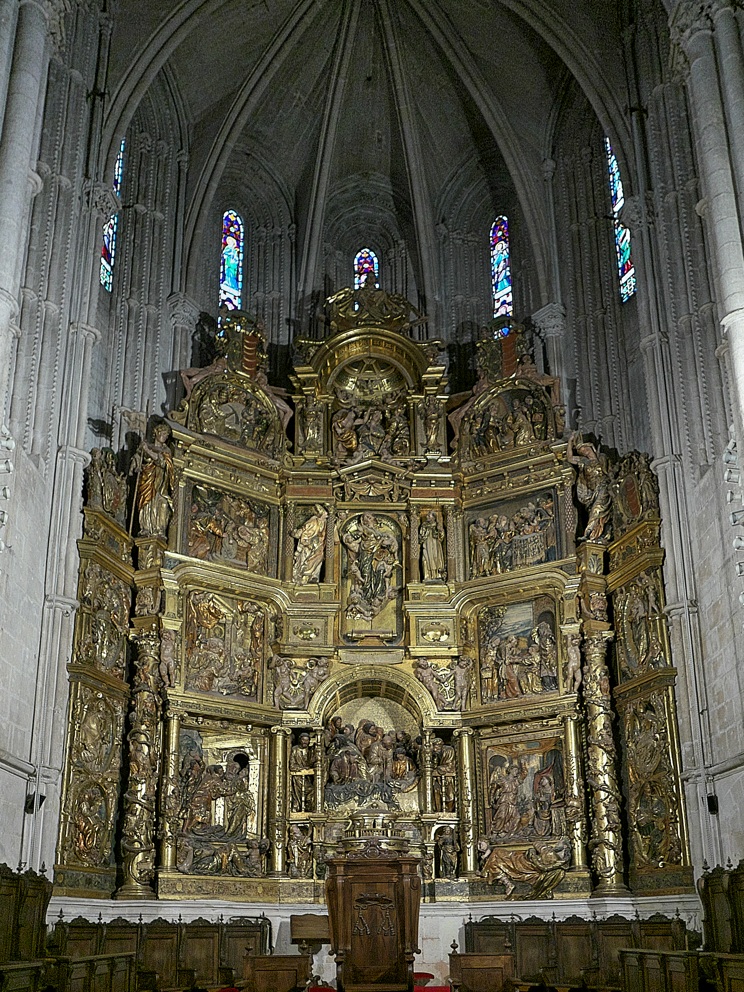 El obispo Pedro Álvarez de Acosta promueve el retablo mayor de la catedral (1550-1554), contratando a Juan de Juni, Juan Picardo y Pereandrés.